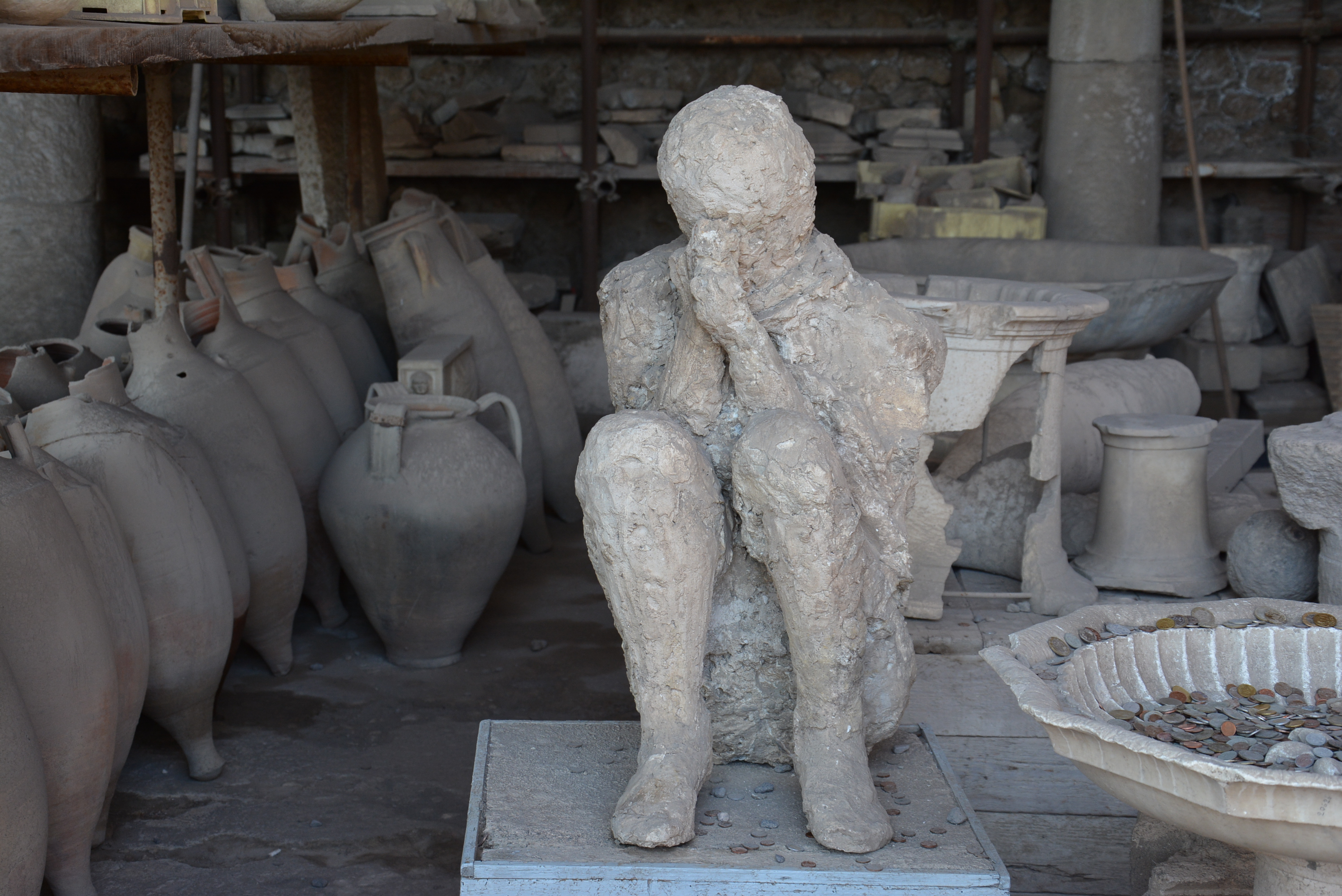 Granai del Foro - MIBACT This is a photo of a monument which is part of cultural heritage of Italy.